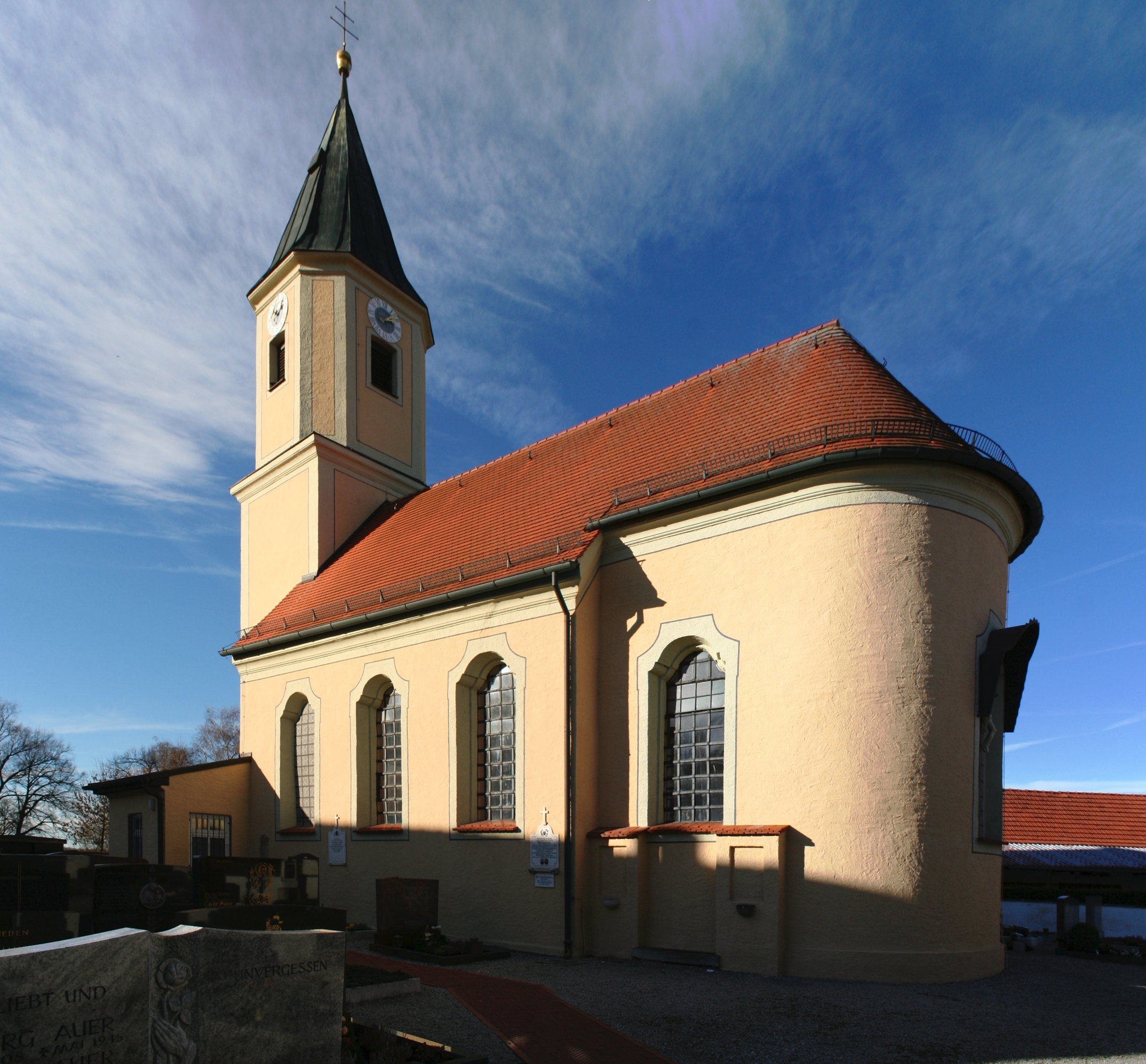 Turm der Filialkirche St. Erhard in Attaching (Freising)